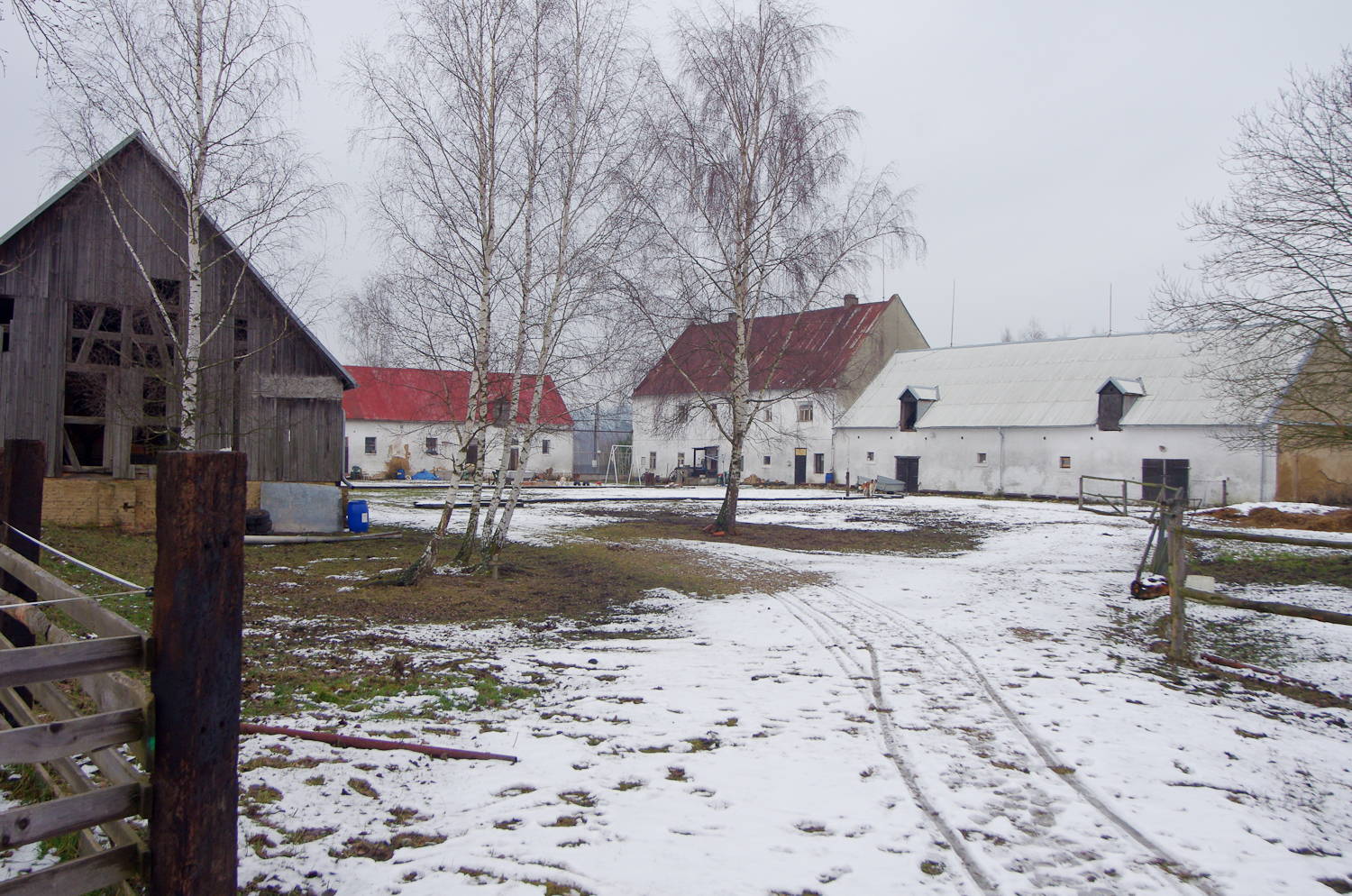 Zemědělský dvůr - Nový dvůr (Dolní Pochlovice), Dolní Pochlovice 1